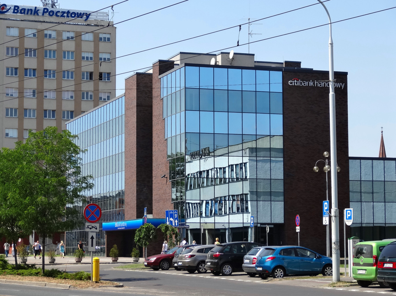 Citibank w Bydgoszczy przy ul. Jagiellońskiej